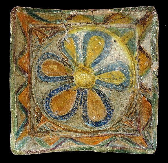 Паліхромная кафля з Брагіна. Old Belarusian History Museum Native nameМузей старажытнабеларускай культурыLocationMinsk, BelarusCoordinates53° 55′ 00.31″ N, 27° 36′ 11.96″ E Established1977Web page control : Q6511262 ISNI: 0000 0001 0791 3038 institution QS:P195,Q6511262